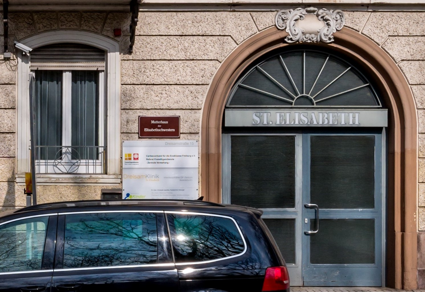 Eingang zum früheren Elisabethkrankenhaus in der Freiburger Dreisamstraße 15